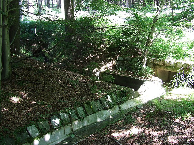 Überlaufbauwerk Höllgrundbach - Kielfloßgraben